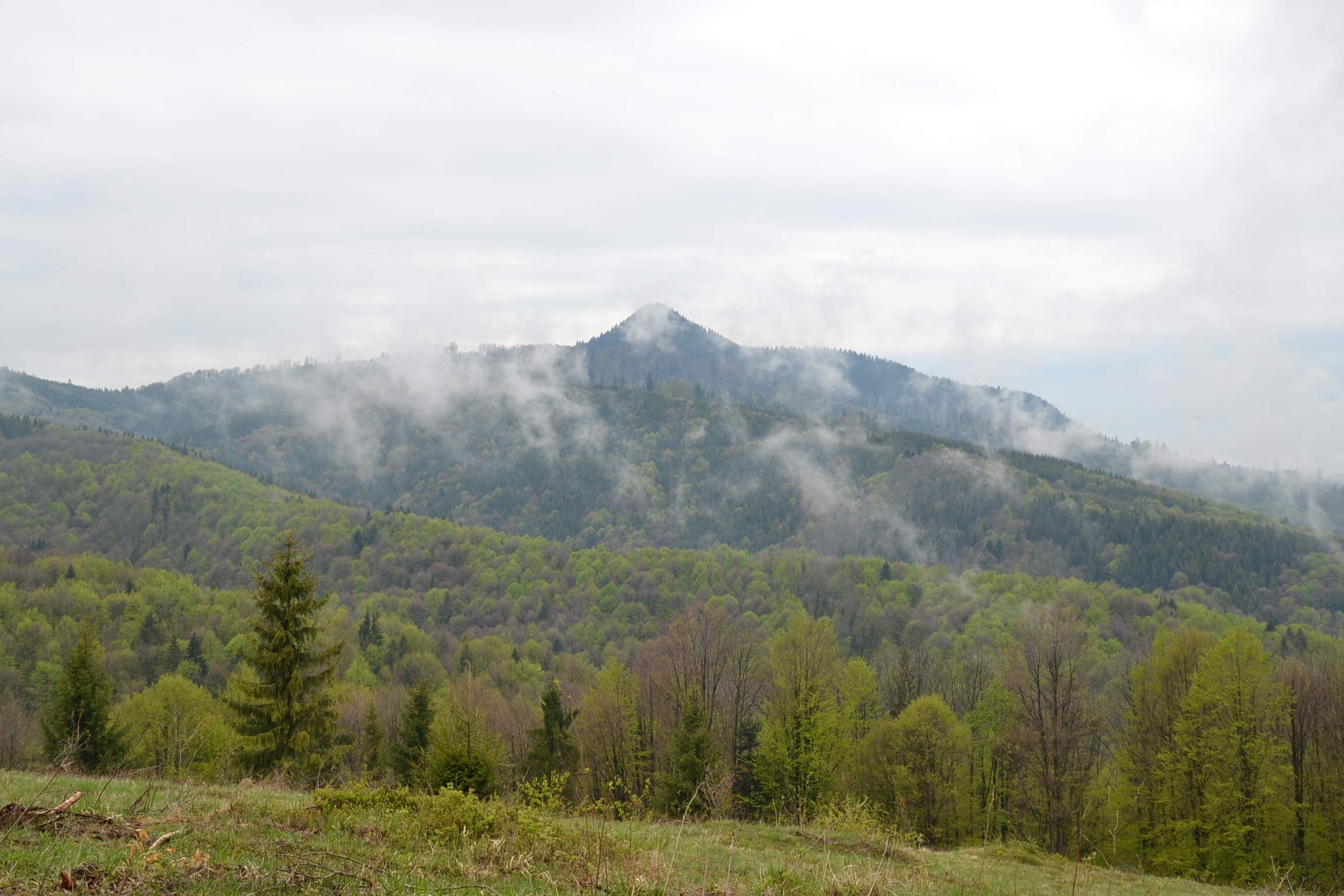 Klenovský vepor, Veporské vrchy